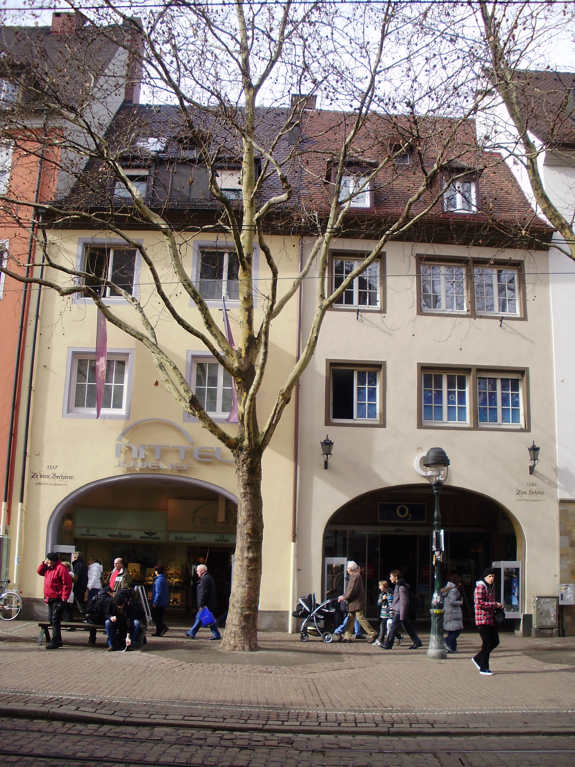 Haus Nittel und Haus Herr in der Freiburger Kaiser-Joseph-Straße, 1944 zerstört, nach dem Krieg wieder errichtet, Architekt Hans Geiges